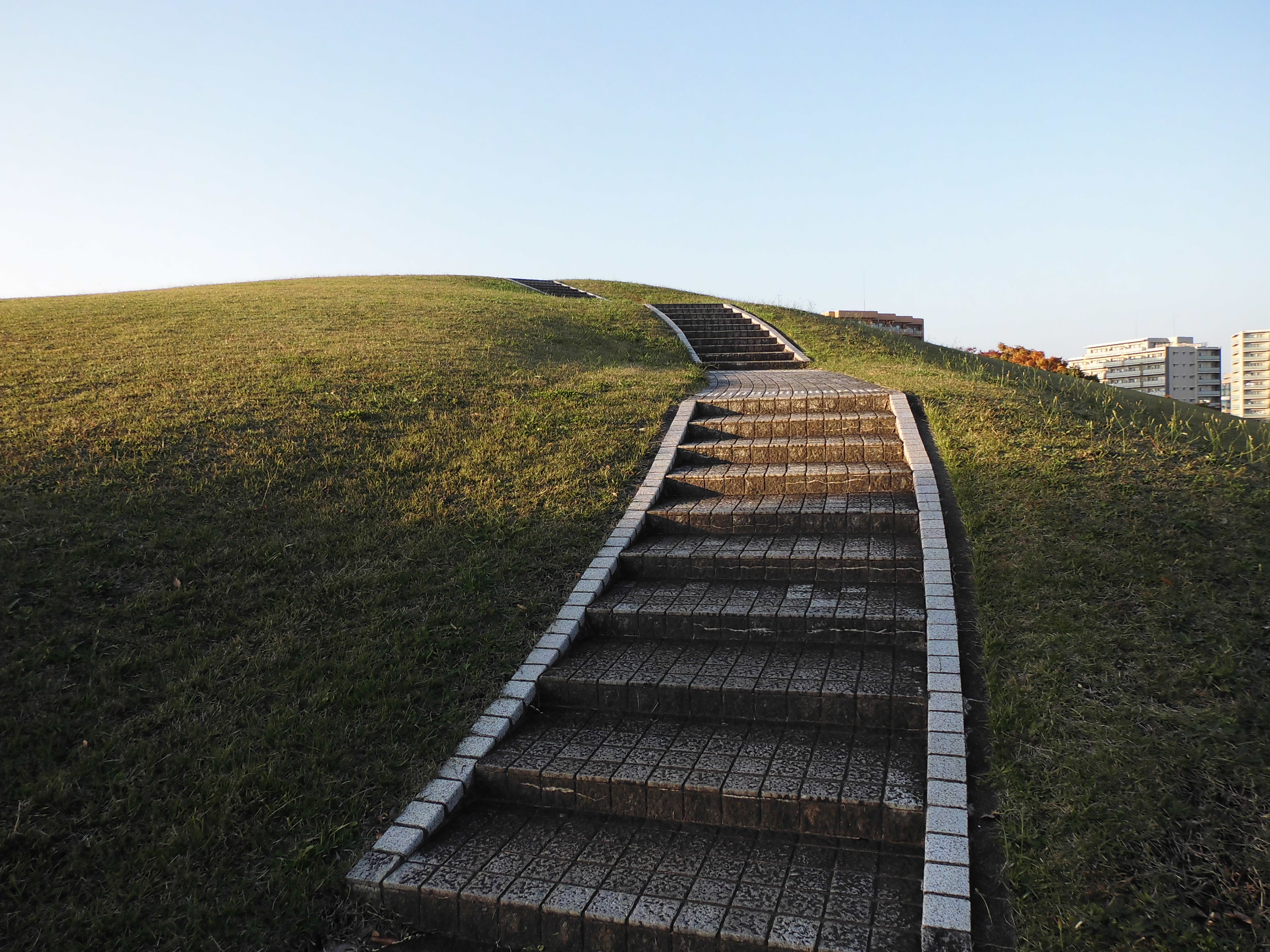 多摩市、鶴牧東公園の「鶴牧山」131106